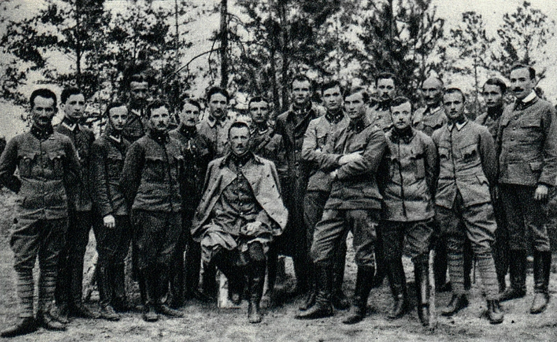 Oficerowie II batalionu 4 pułku piechoty z kapitanem Franciszkiem Sikorskim.